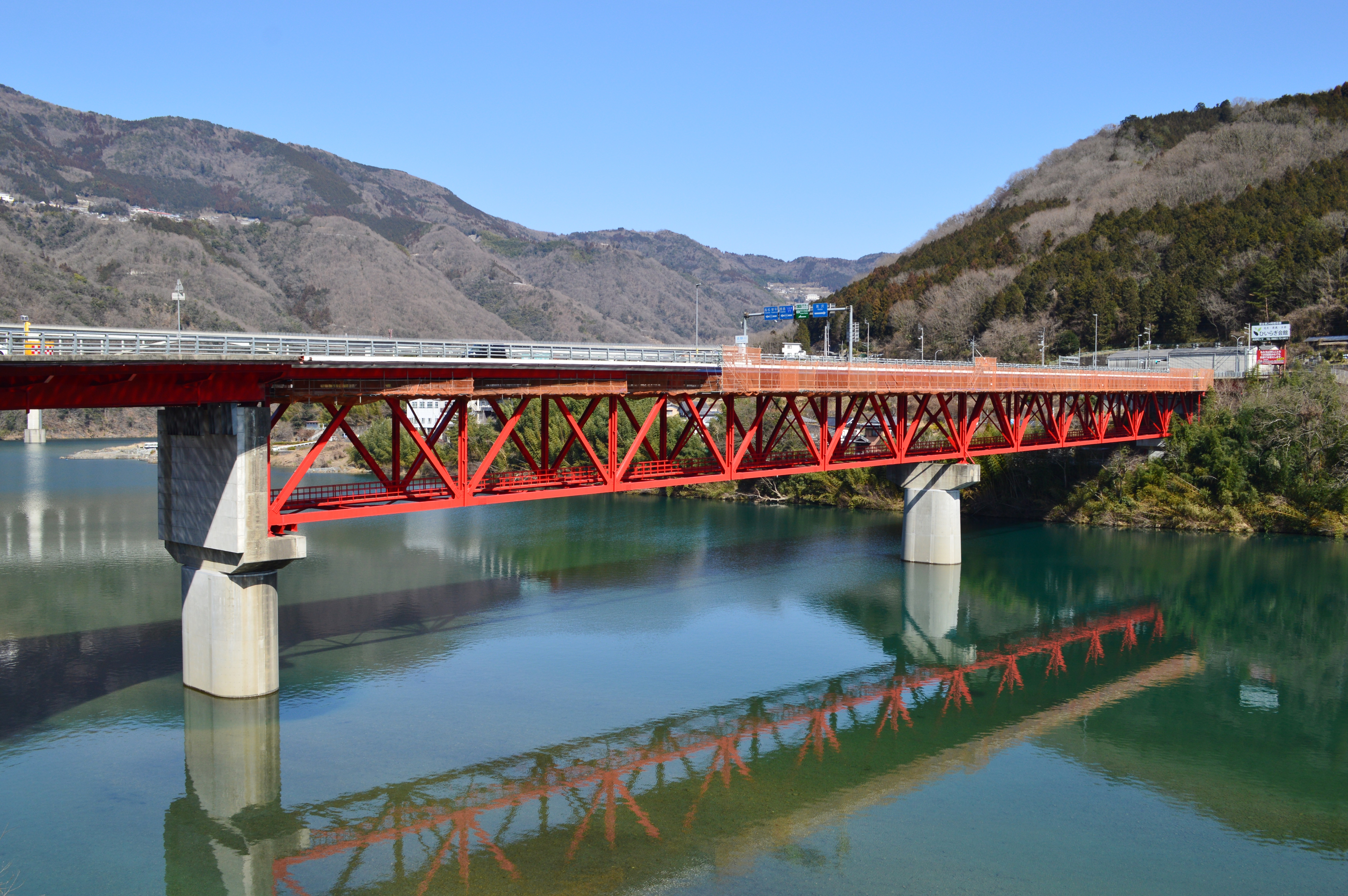 池田大橋 (徳島県) 全景